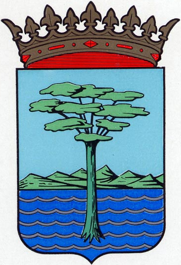 Escudo de Bata, en la provincia Litoral (Guinea Ecuatorial)